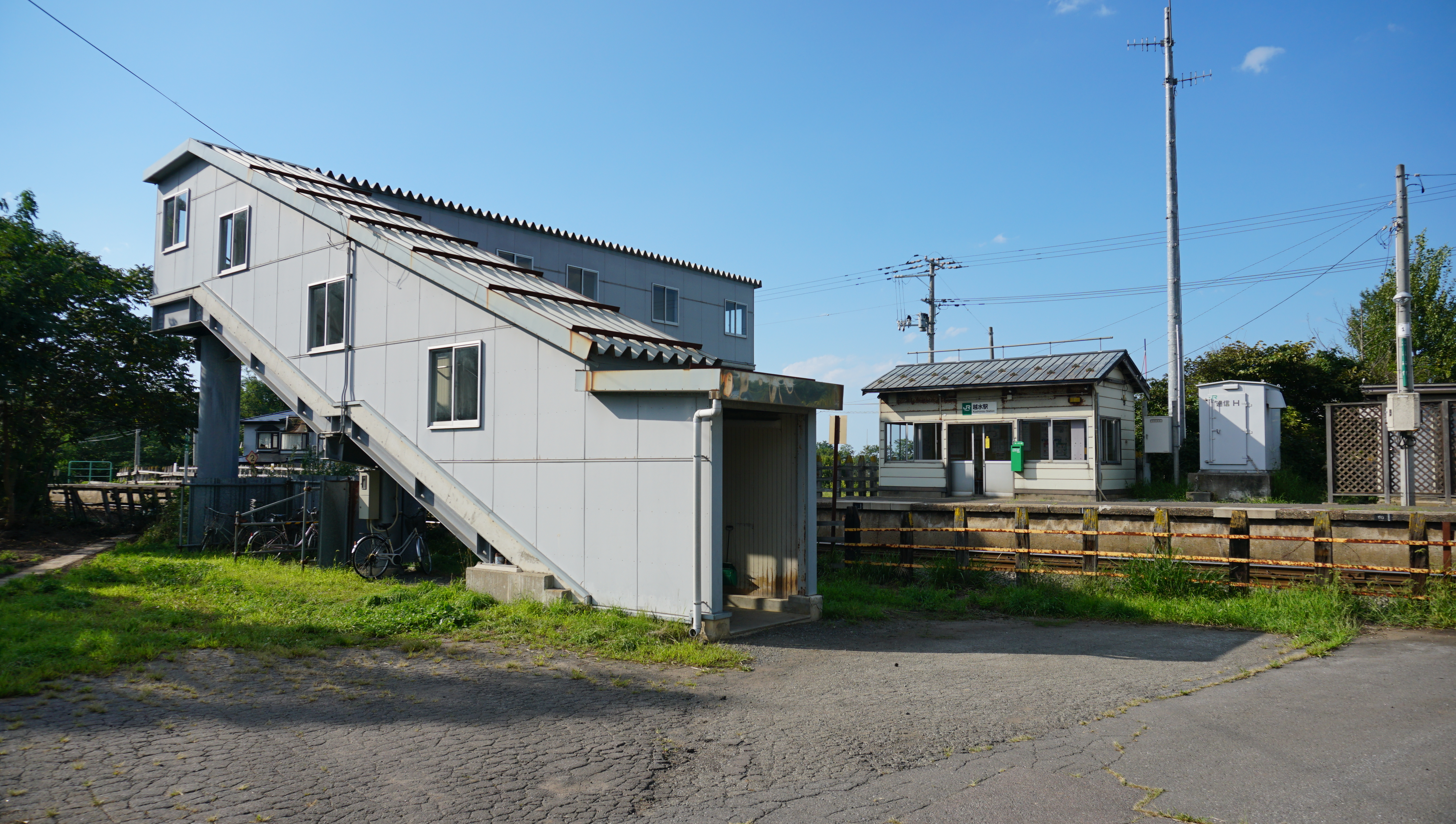 五能線 越水駅（青森県つがる市）